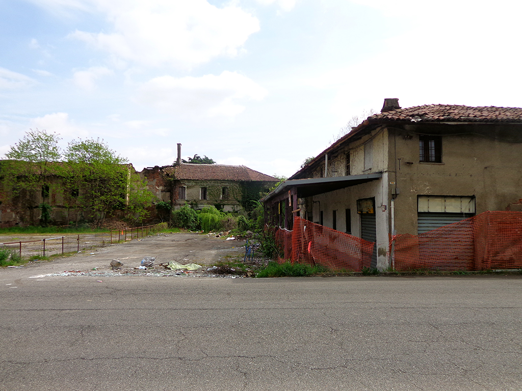 Milano, cascina Assiano.